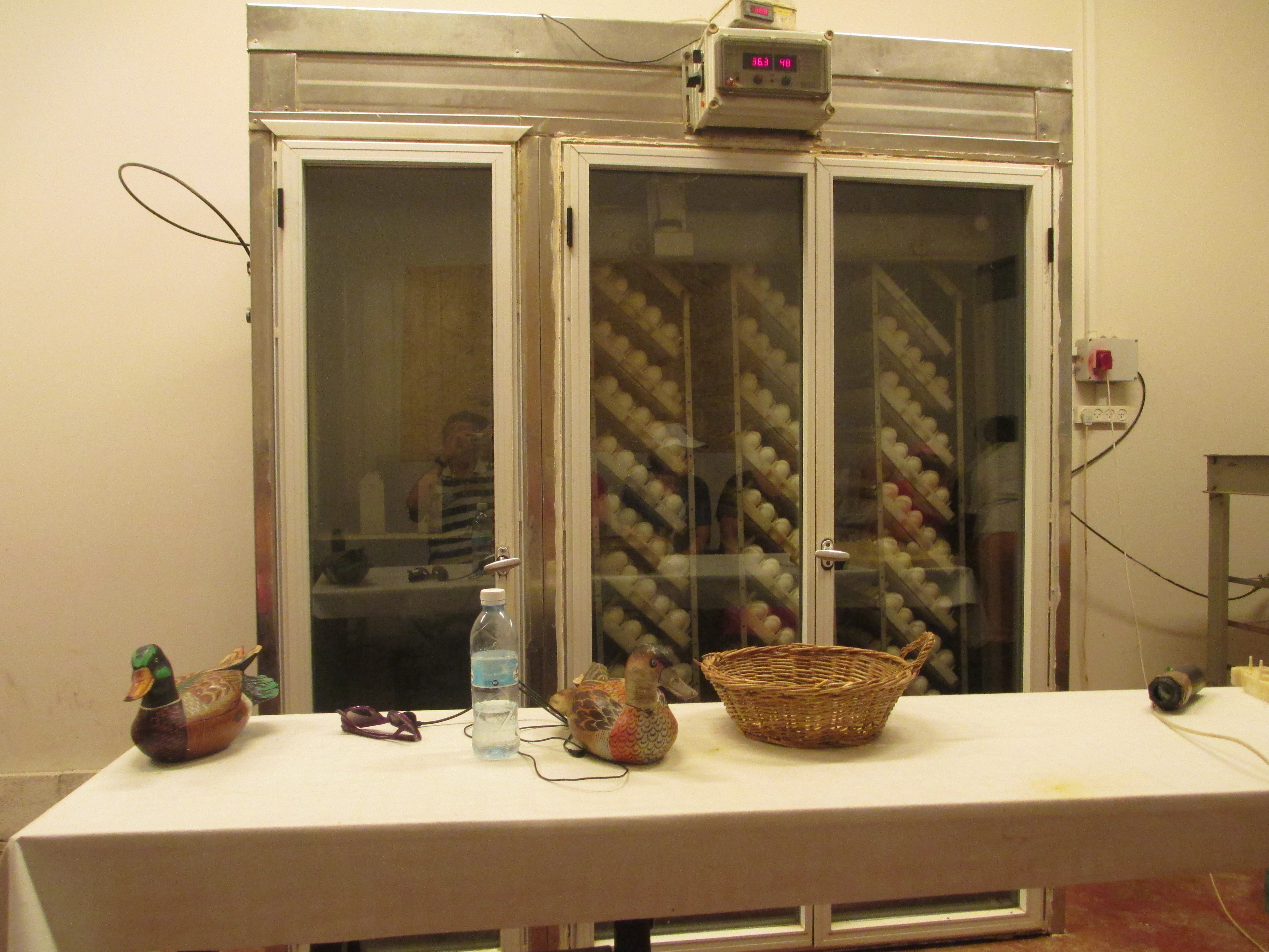 מדגרה בחוות ברווזים בכפר , בכפר ברוך